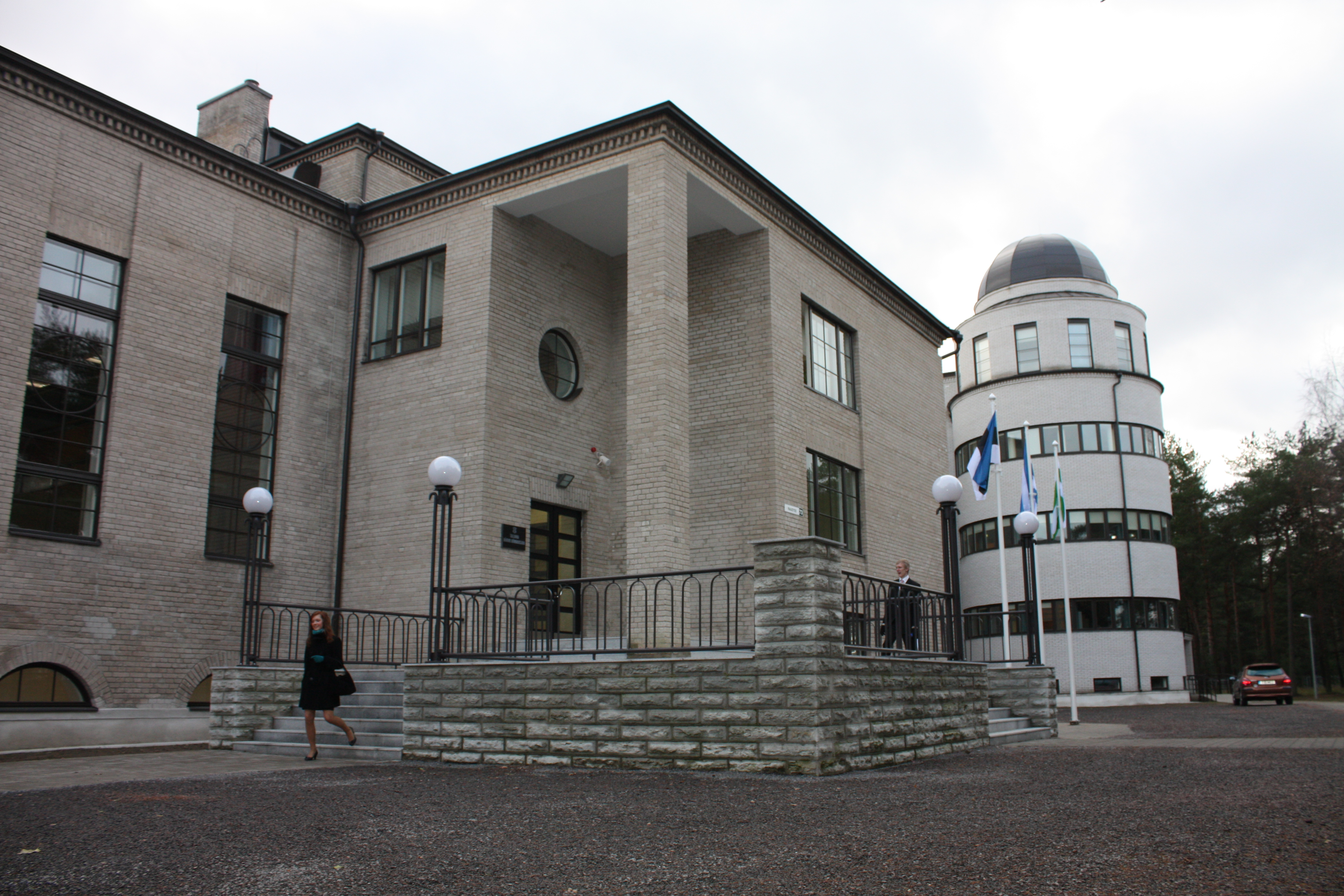 Tallinna Nõmme gümnaasiumi peahoone, Raudtee 73